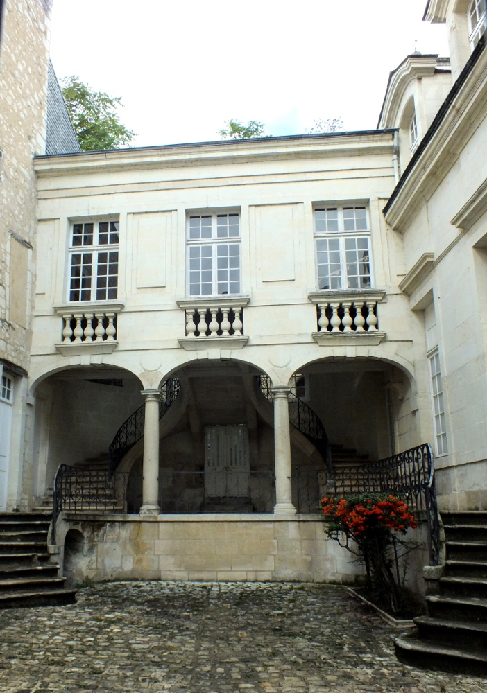 Cet hôtel particulier de la fin du 17e siècle remarquable par son escalier double aurait servi de résidence au gouverneur du château de Chinon.